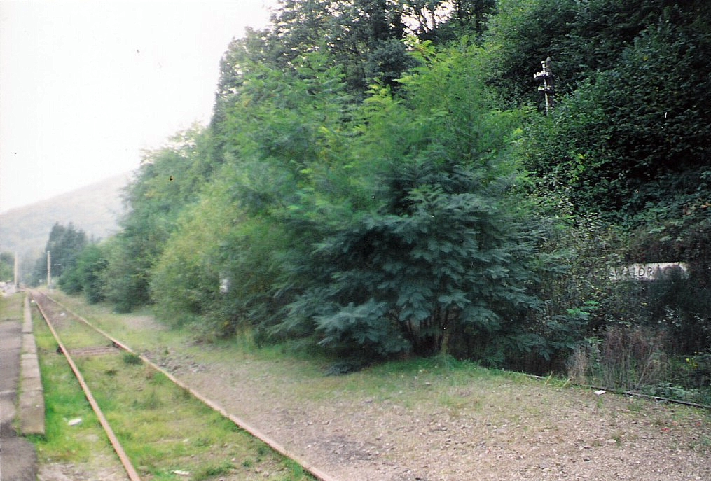 Der ehemalige Bahnhof Waldrach an der Hochwaldbahn Trier-Hermeskeil 1996.